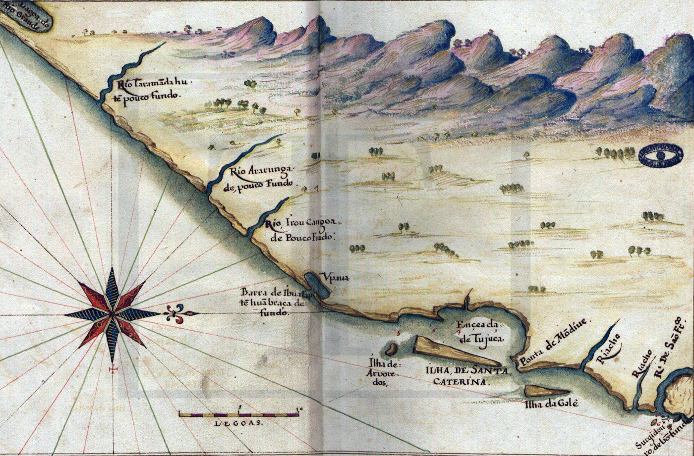 Mapa do litoral de Santa Catarina de 1640 desenhado por João Teixeira Albernaz